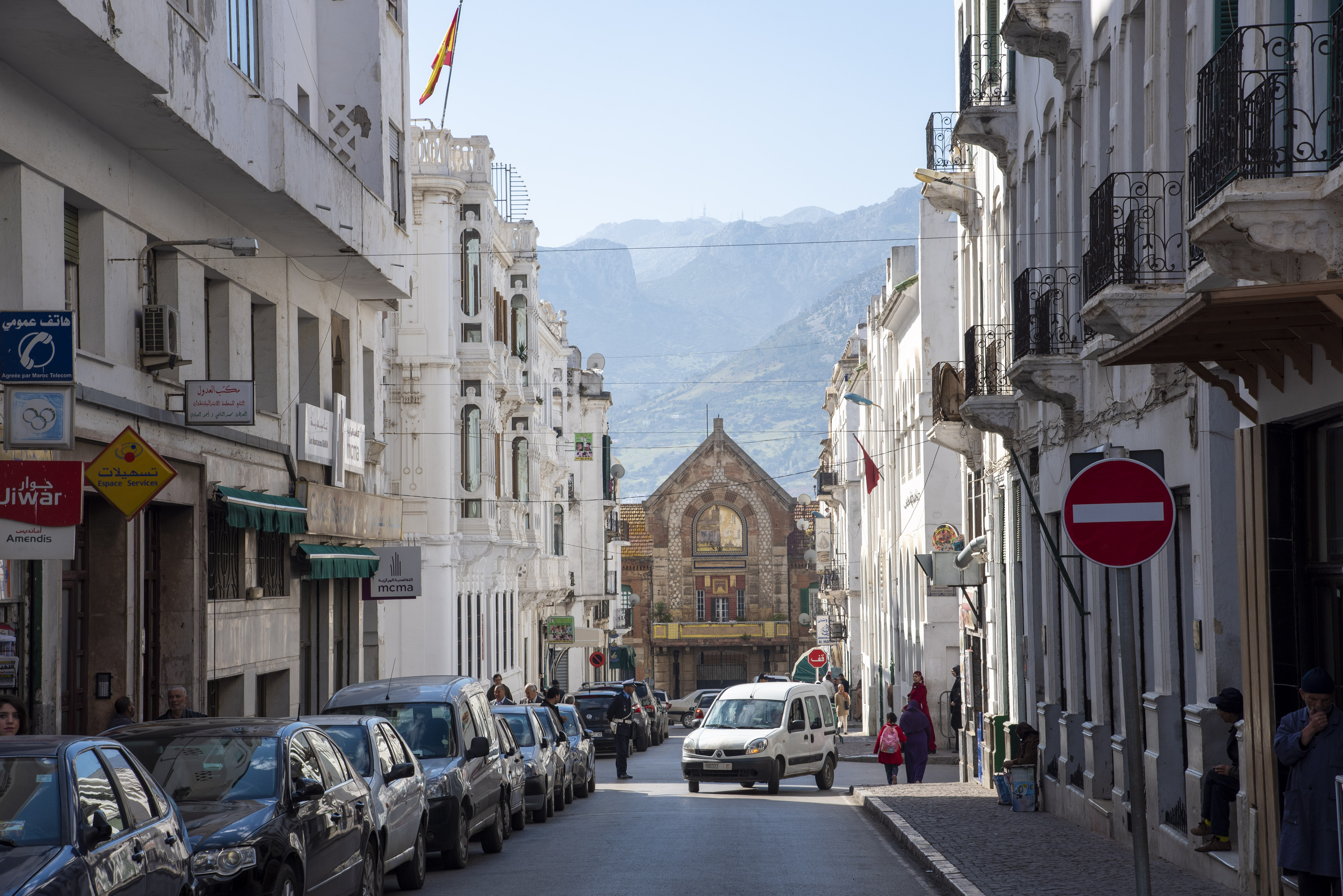 רחוב בטיטואן